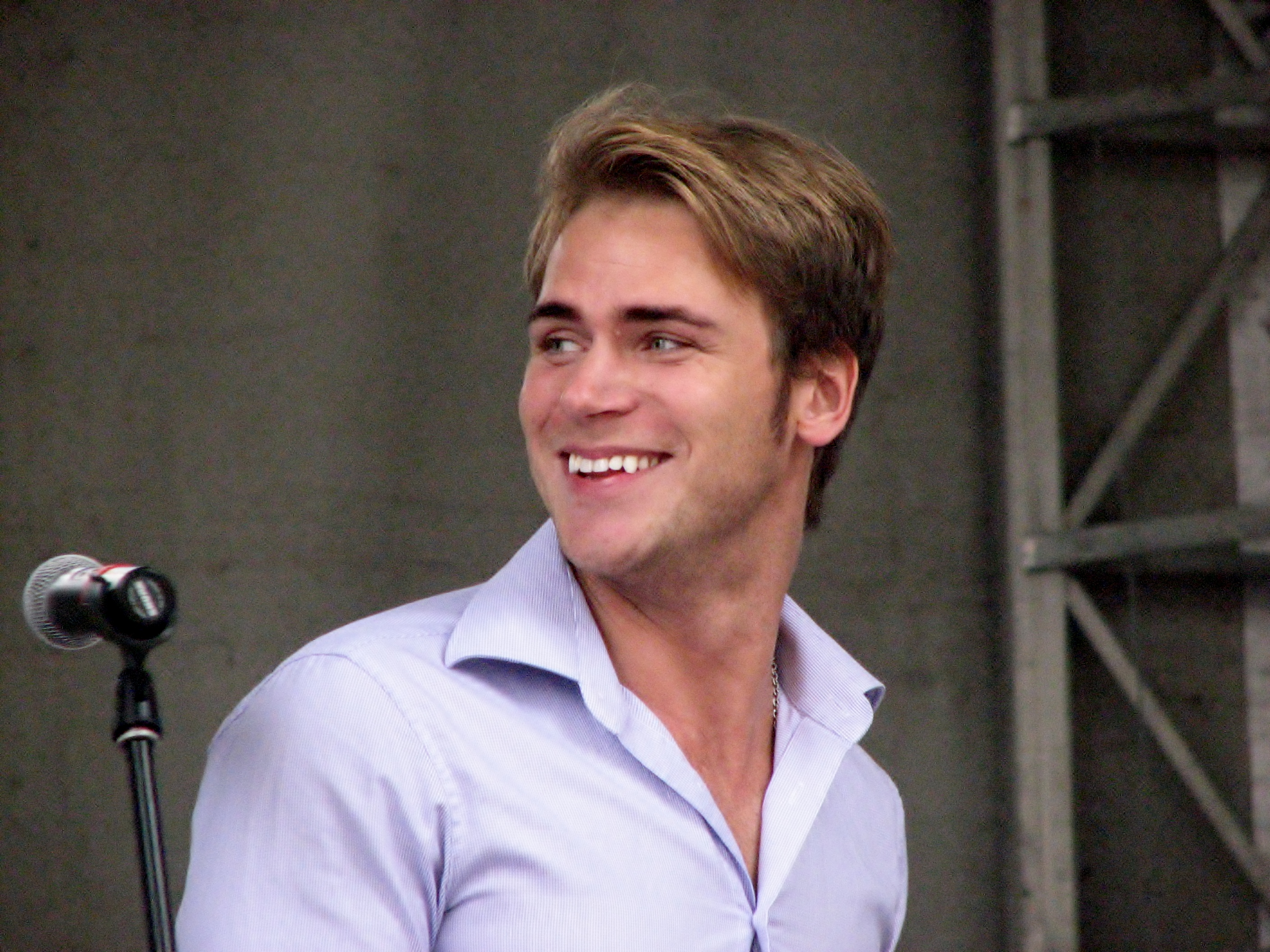 Uku Suviste esinemas Vaba Rahva Laulul Kuressaare lossihoovis